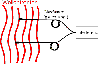 Interferenz zweier Punkte auf einer Wellenfront als Bezug zur räumlichen Kohärenz